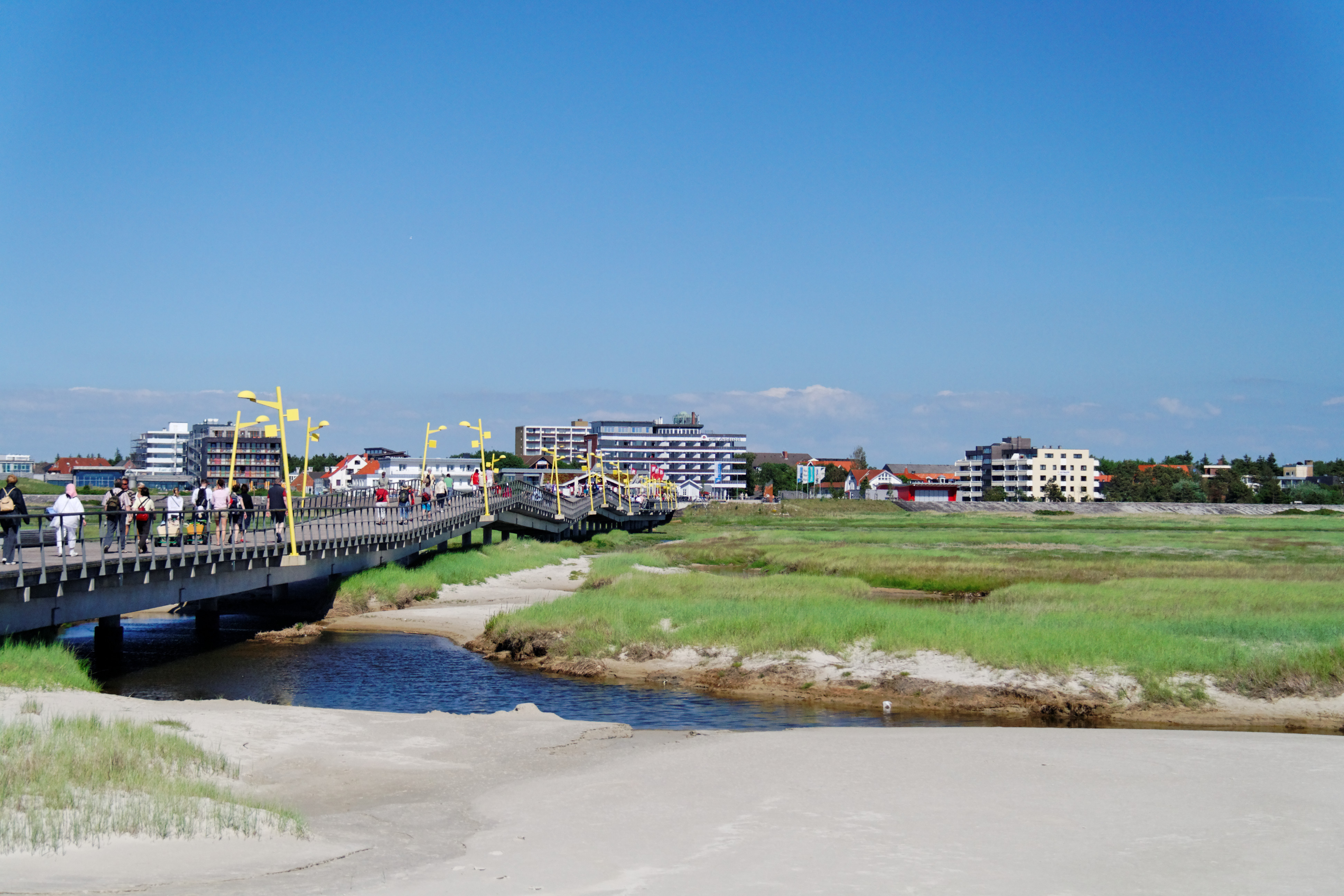 Blick auf die Erlebnispromenade von Sankt Peter-Ording mit dem Zugang zum Strand über die Strandbrücke